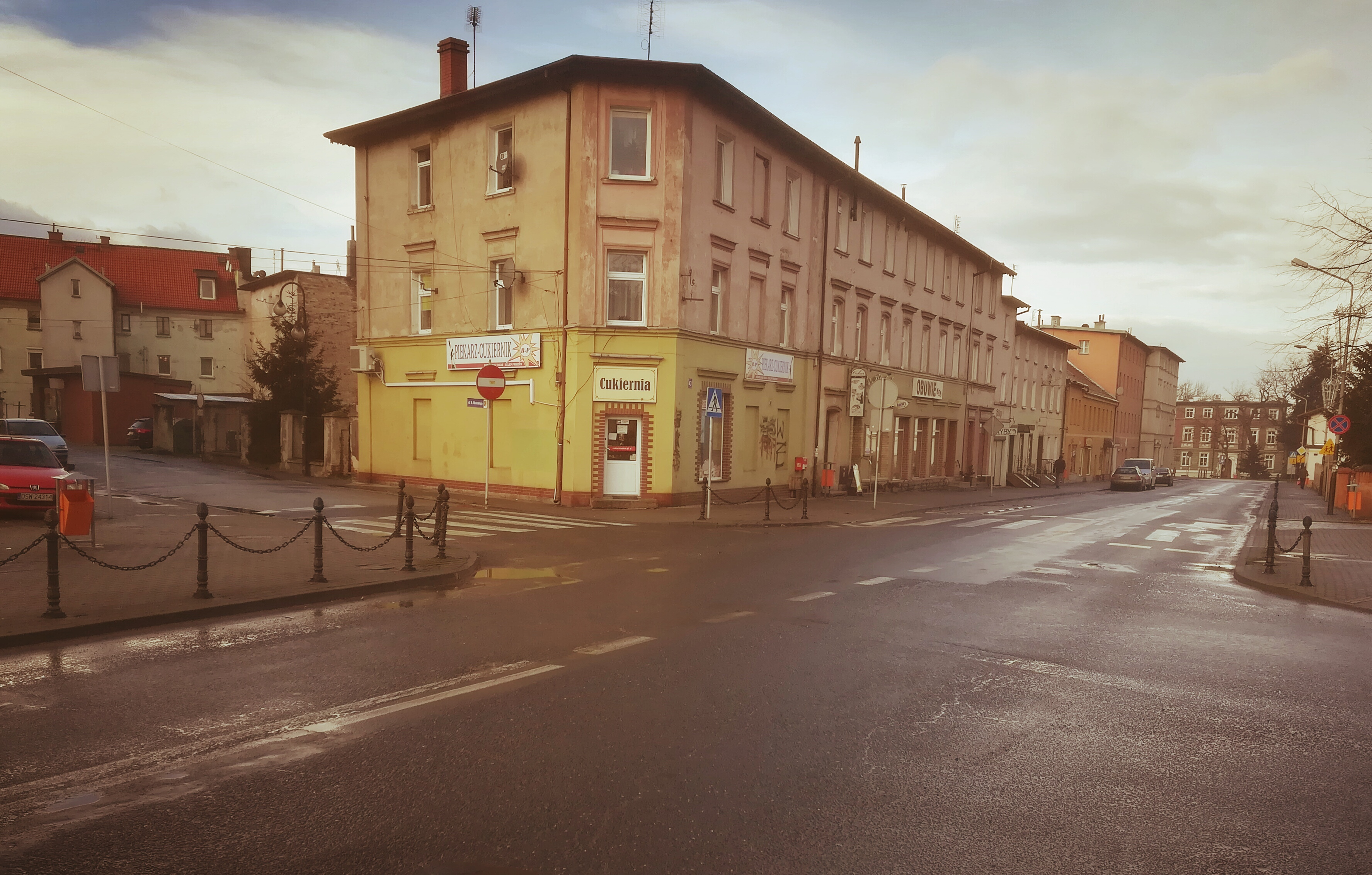 Fragment centrum Żarowa.